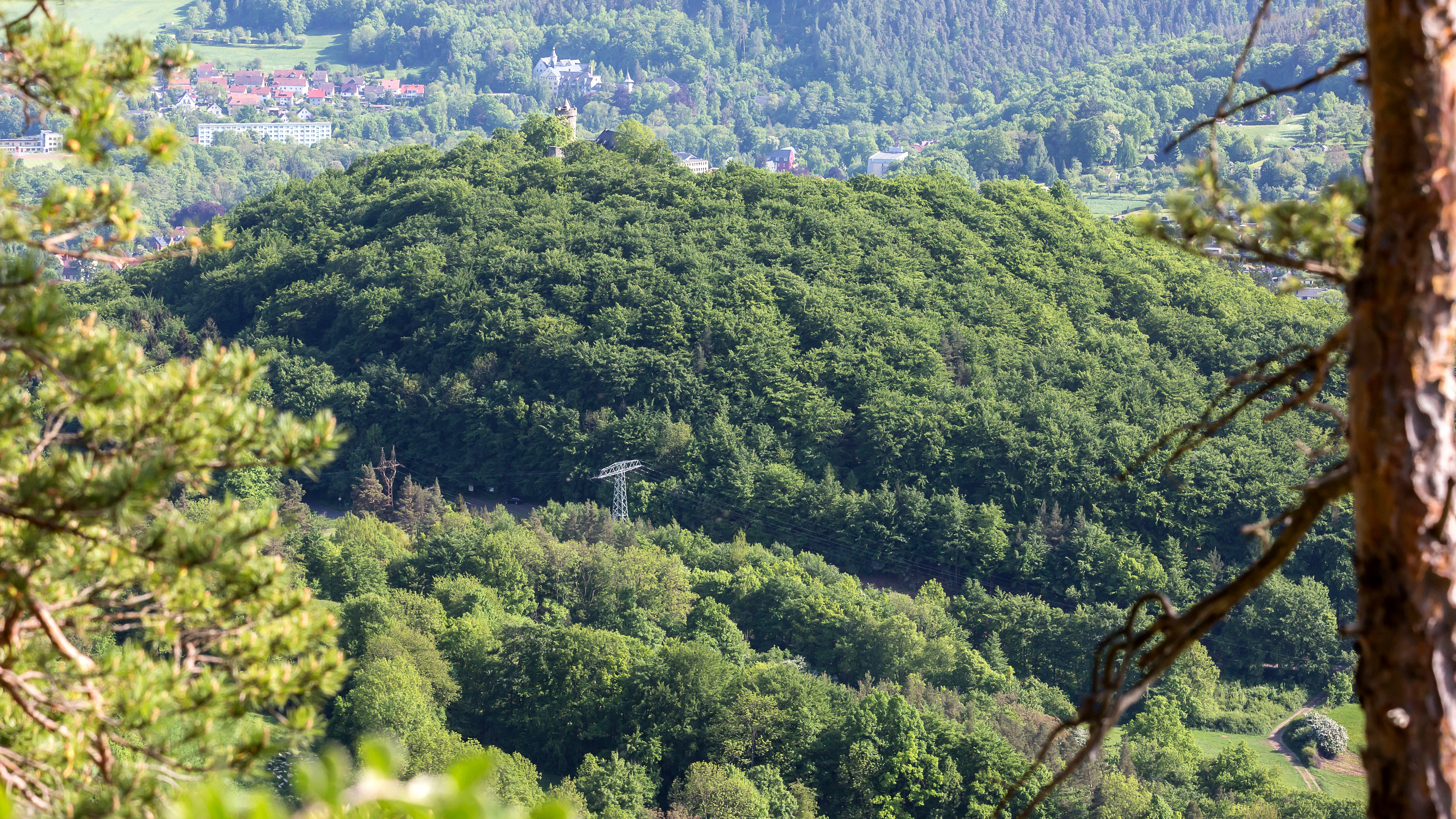 NSG 158 Greifenstein (Gebiet an der Burg Greifenstein) Landkreis Saalfeld-Rudolstadt DE -TH 1 ,dieses Gebiet erstreckt sich vom Burgberg bis hin zum benachbarten Kesselberg. Prägend sind die Buchenmischwälder und weitere botanische Besonderheiten wie; Aufrechter Ziest(Stachys recta),Duft-Schöterich (Erysimum odoratum),Schwarze Teufelskralle (Phyteuma nigrum) , Rote Waldvögelein (Cephalanthera rubra) .